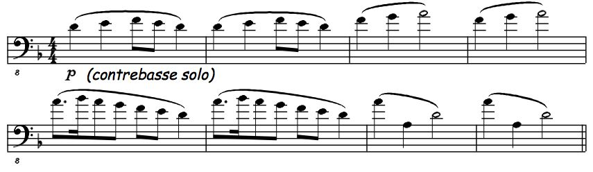 extrait 3e mouvement 1re symphonie Mahler (1 thème)